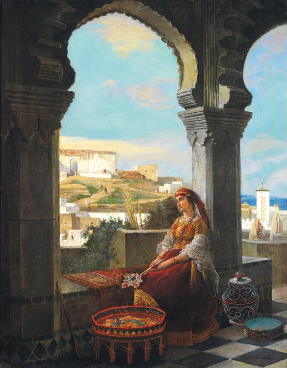 Jeune Marocaine pensive sur la terasse